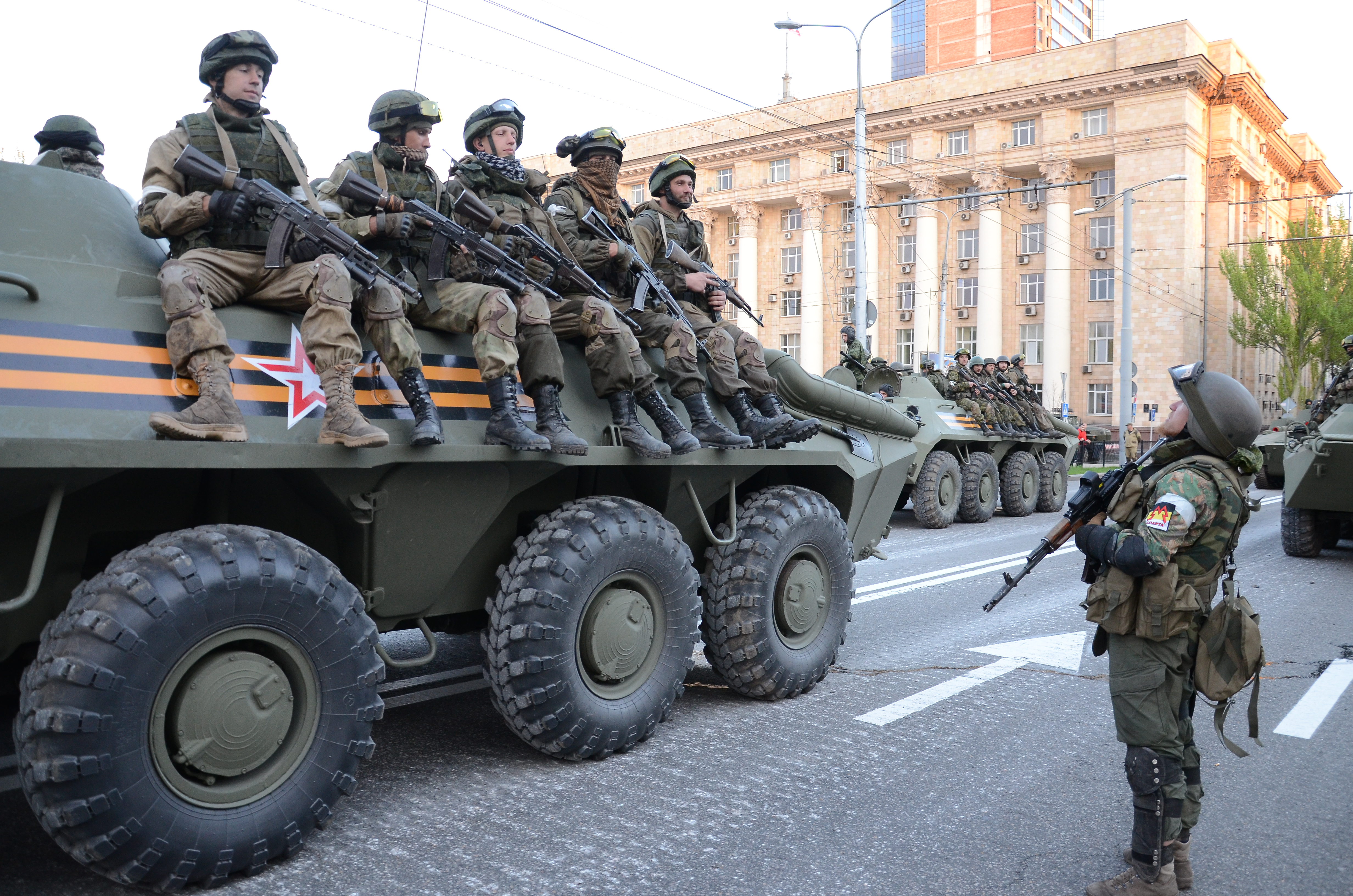 Репетиция парада в честь дня Победы в Донецке